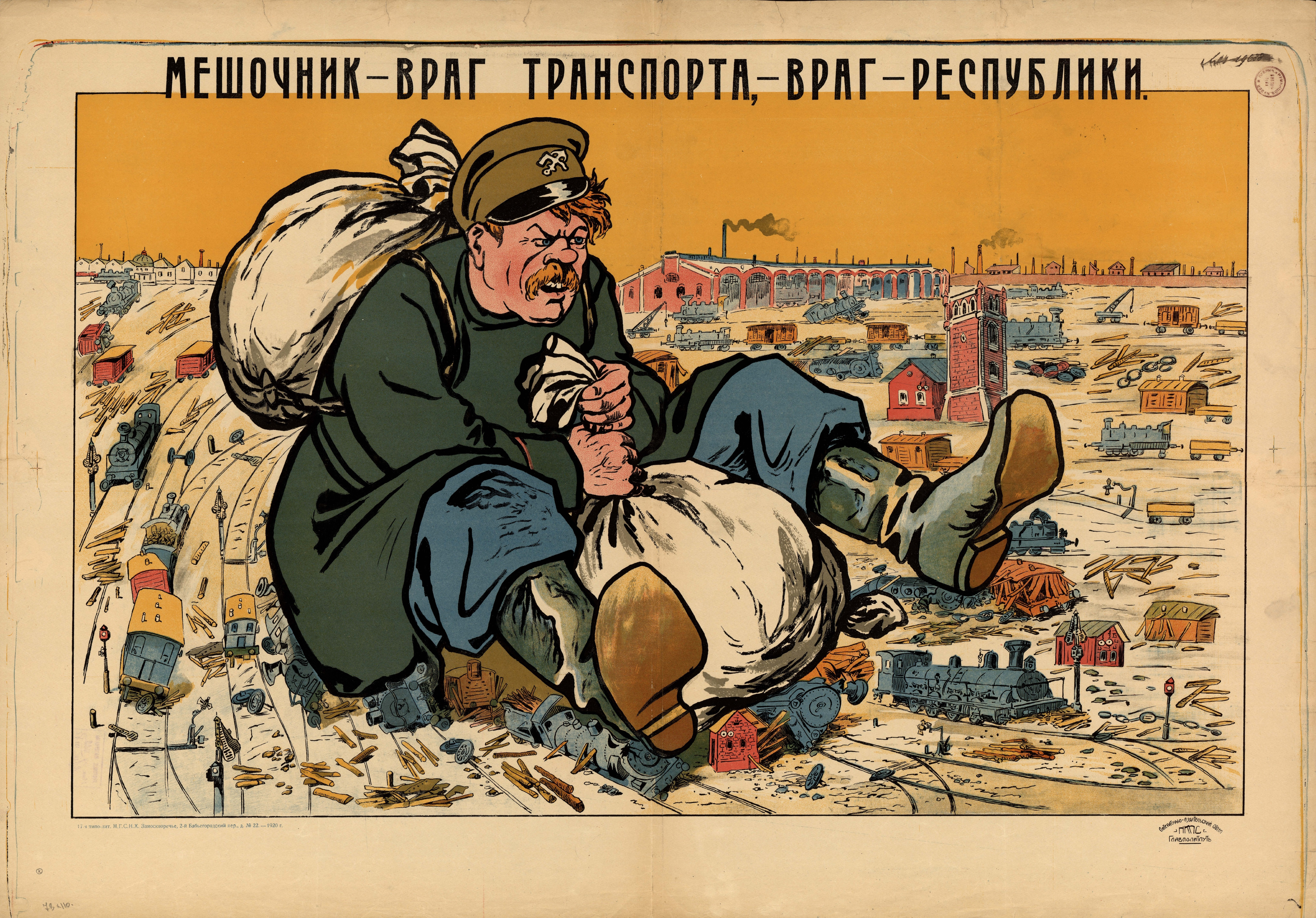 Плакат «Мешочник — враг транспорта, враг республики». Москва : Литературно-издательский отдел НКПС ; Главполитпуть, 1920 (Замоскворечье : 17-я типолитография МГСНХ). Цветная литография, 1 лист, 78×110 см